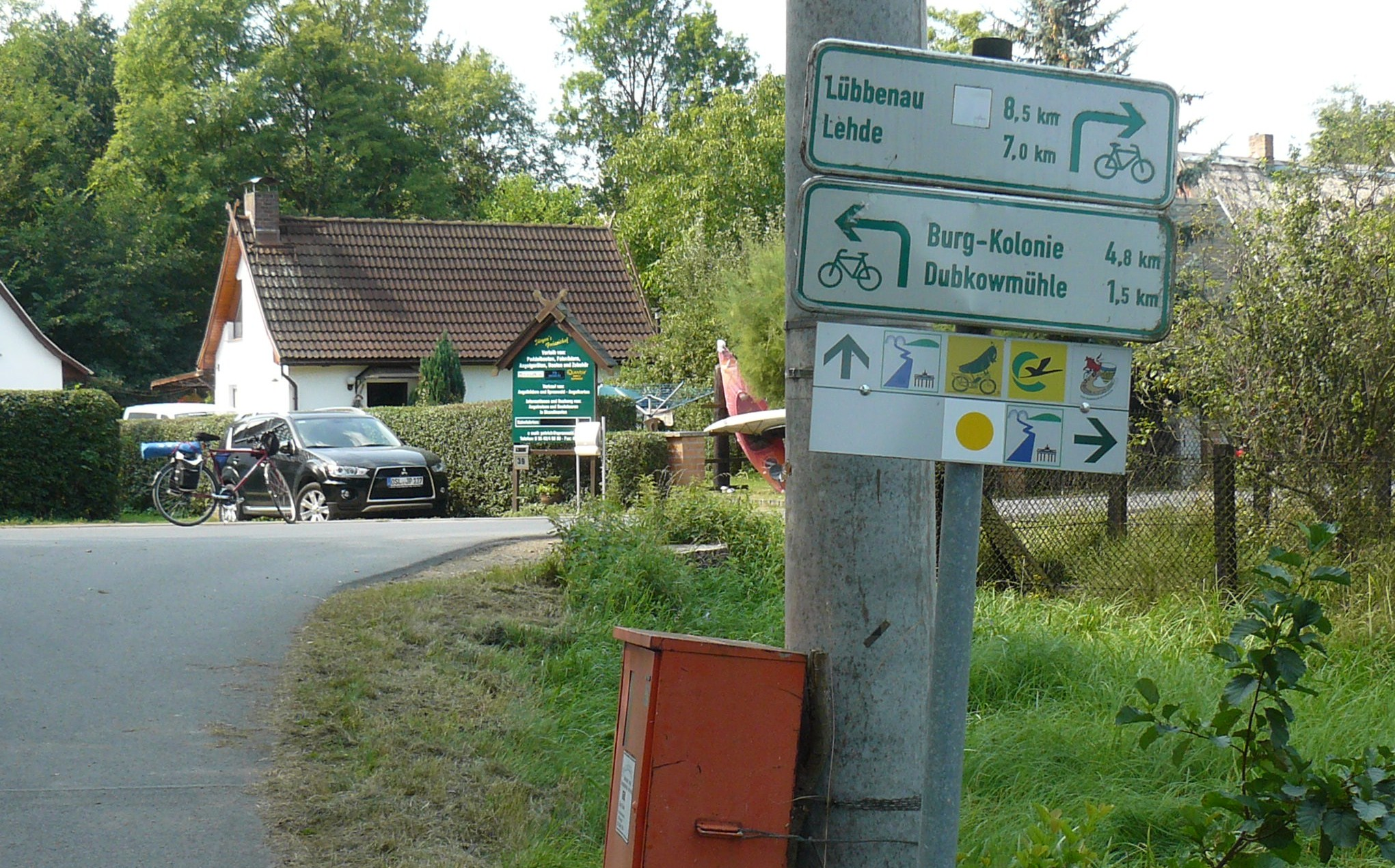 Gurkenradweg. Szlak ogórkowy, Spreewald.